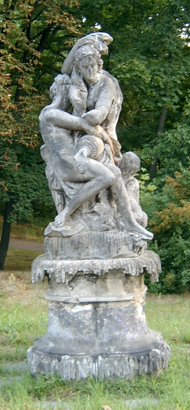 Sandsteinplastik Mythologische Figurengruppe in Frankfurt (Oder). Sie steht am Rand des Lennéparks direkt an der Rosa-Luxemburg-Str.